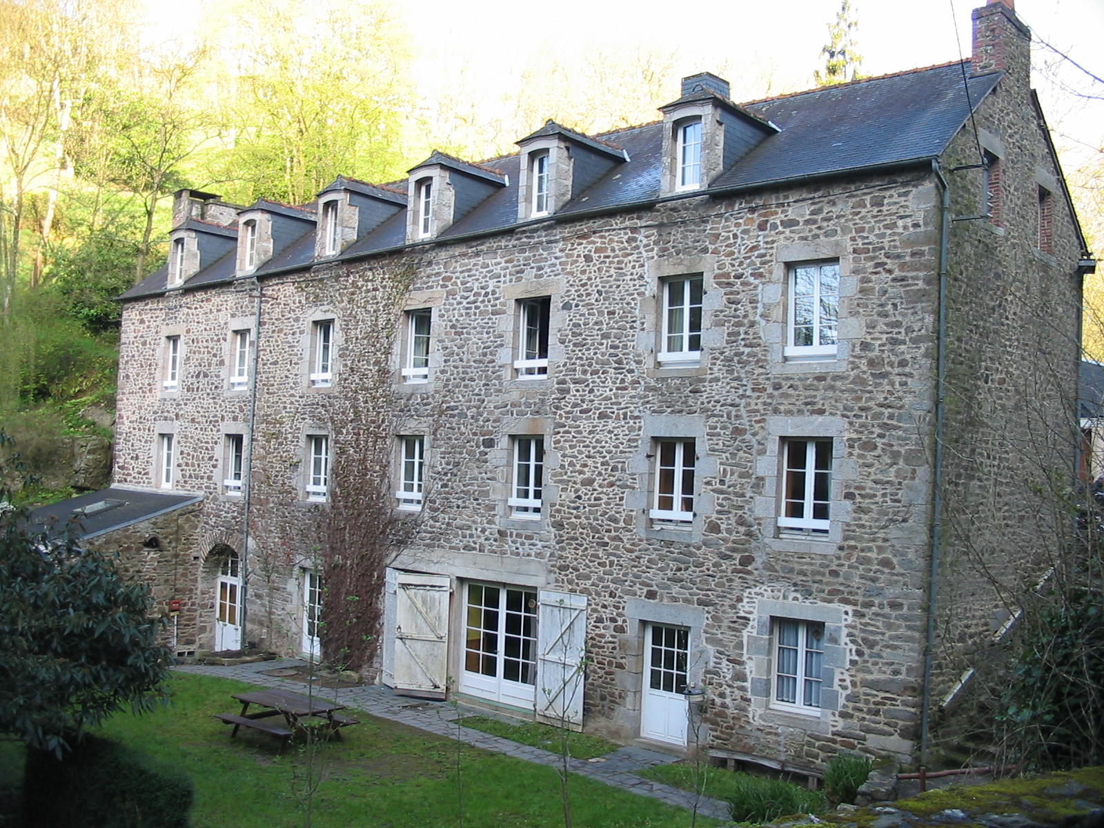 Auberge de jeunesse de Dinan (Côtes d'Armor). Je suis l'auteur du cliché pris en avril 2006